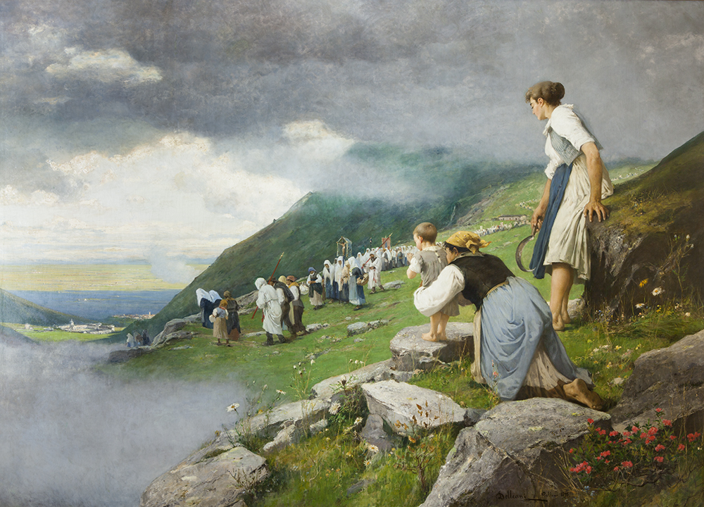 Dipinto conservato a Palazzo Mazzetti ad Asti.